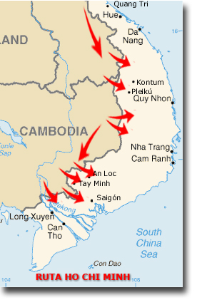 Gráfico realizado partiendo del de la coleción Nam Crónica de la Guerra de Vietnam. 17/10/2006.